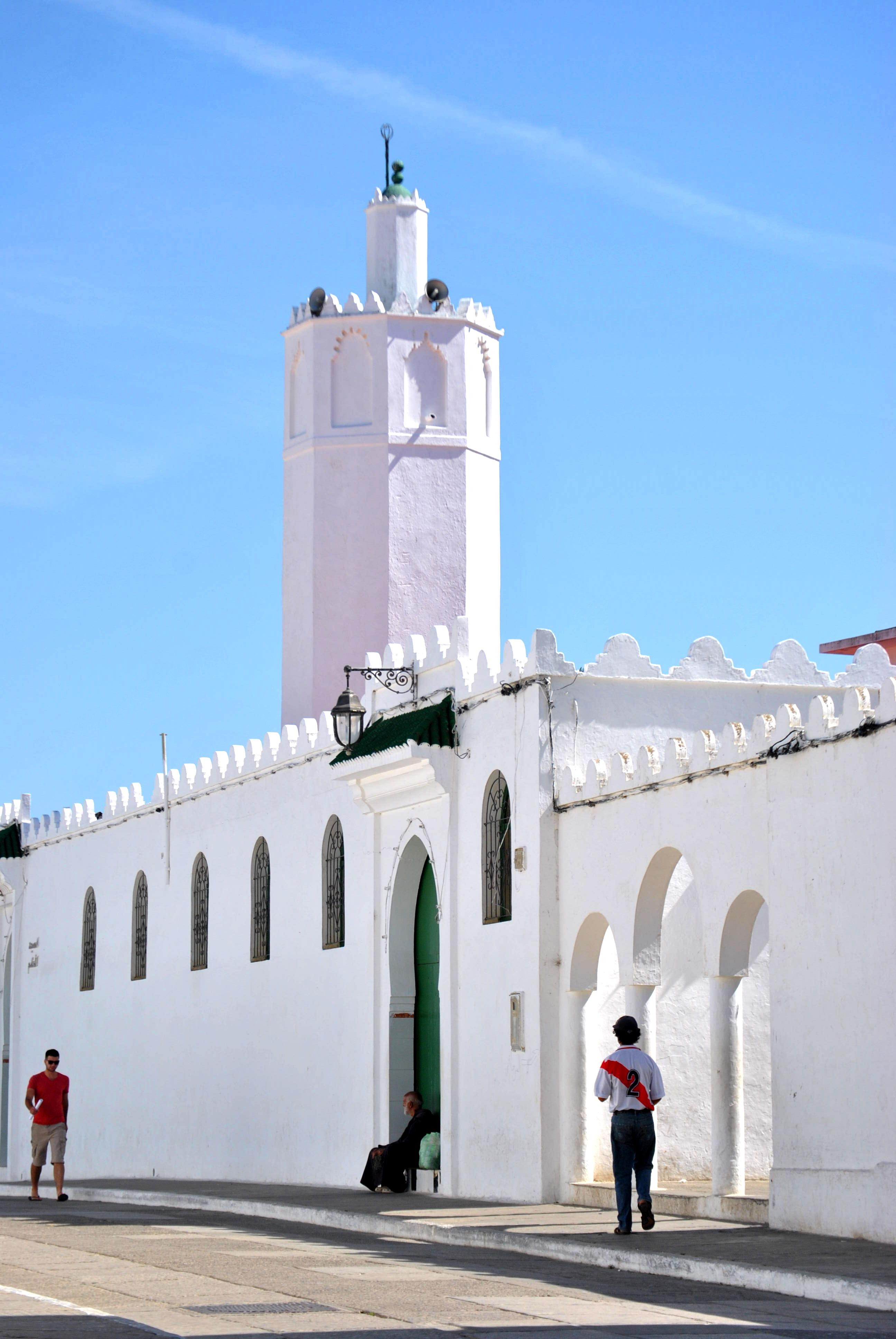 Mosquée à Assilah